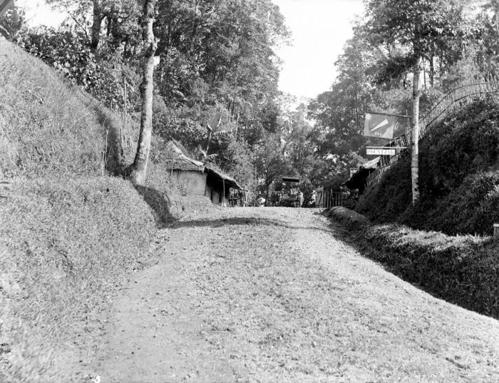 Repronegatief. Puntjak weg, West-Java